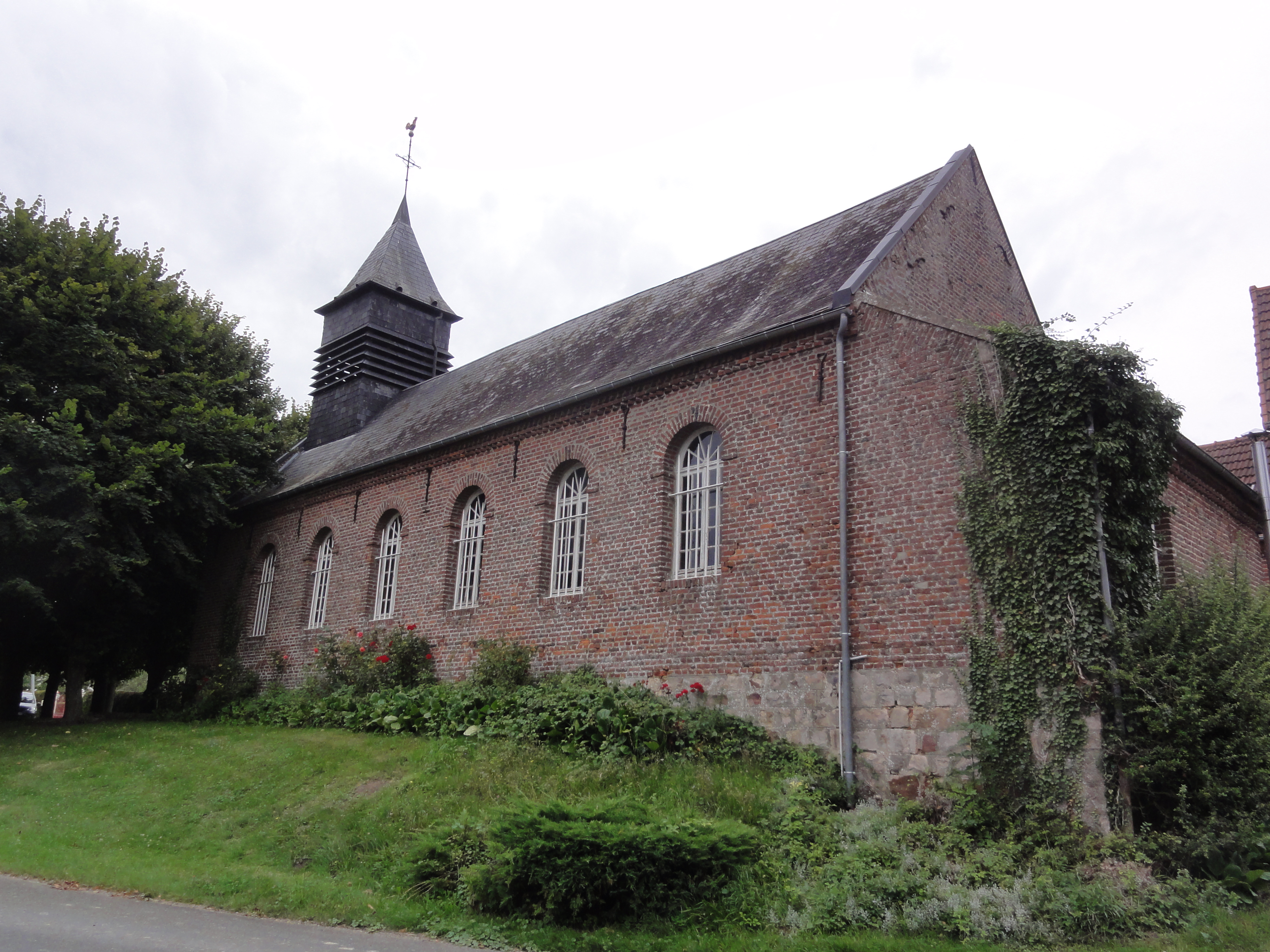 Fontaine-Uterte (Aisne) église